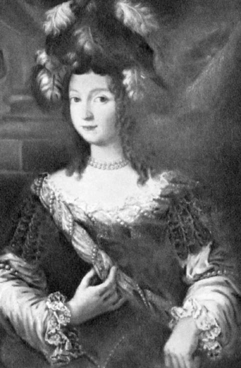 Ludovica Cristina von Savoyen (1629-1692)label QS:Lde,"Ludovica Cristina von Savoyen (1629-1692)"